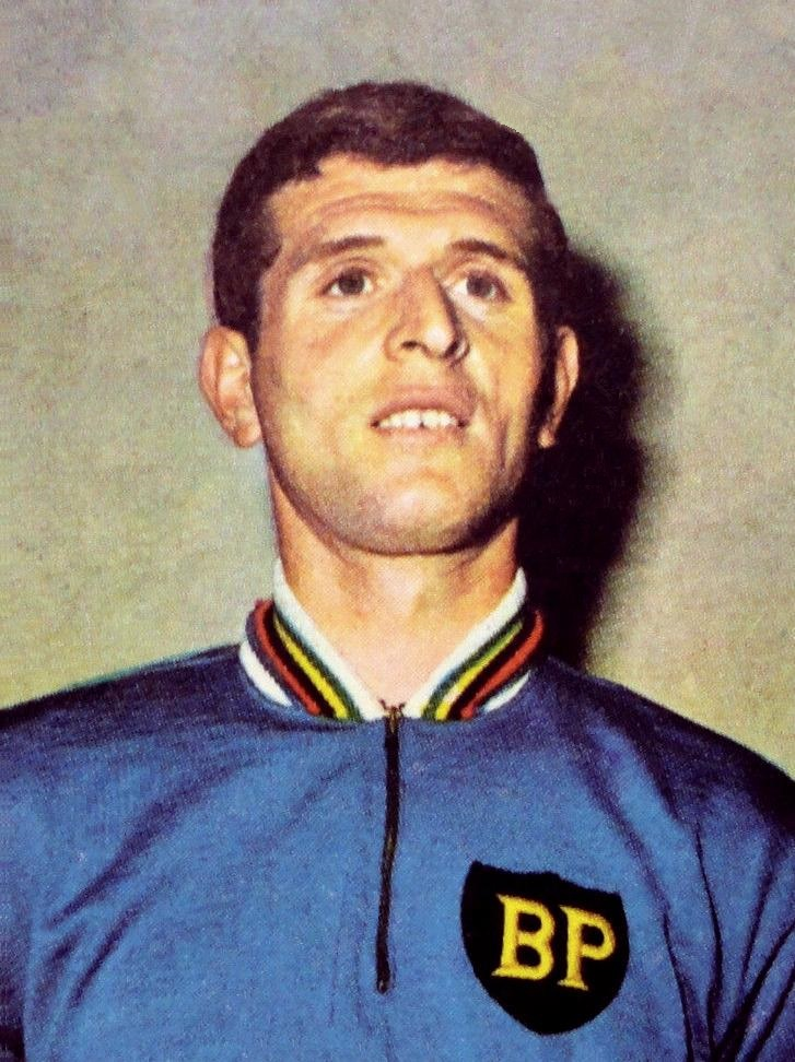 CAMPIONI DELLO SPORT 1970/71-n.161-BRACKE-CICLISMO